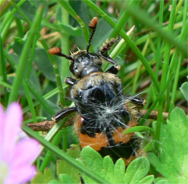 Nicrophorus vespillo, Fort III, Borsbeek, Antwerpen, Belgium